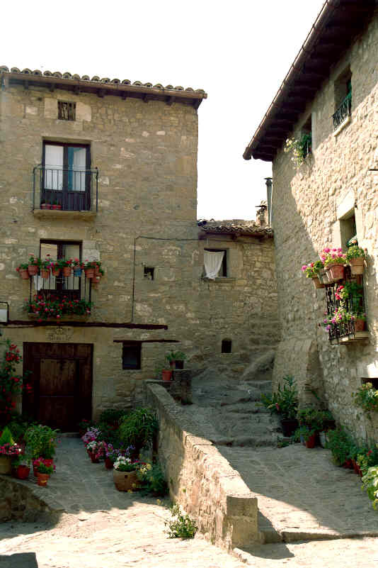 Calle de Sos del Rey Católico, en la provincia de Zaragoza, (España). Tomada por JMSE el 9 de julio de 2003 y cedida a Wikipedia. Categoría: España (imagen) Categoría: Monumentos (imagen)